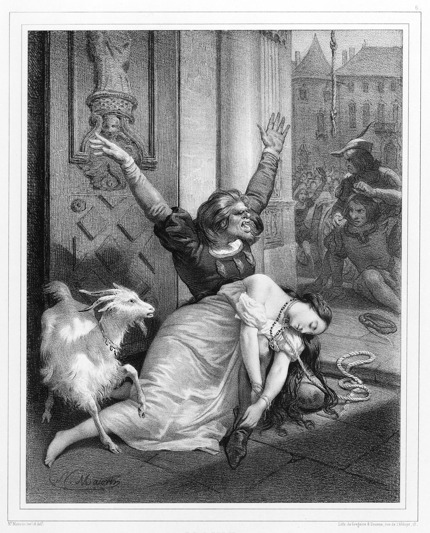 L'asile, lithographie de Nicolas Eustache Maurin.